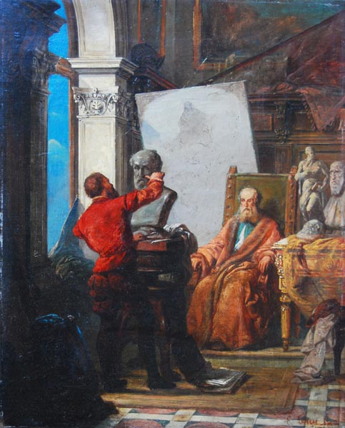 „W pracowni rzeźbiarza” olej, płótno, 55 x 44,5 cm, sygn. p.d.: E. Larese Moretti. Praca po konserwacji, płótno dublowane